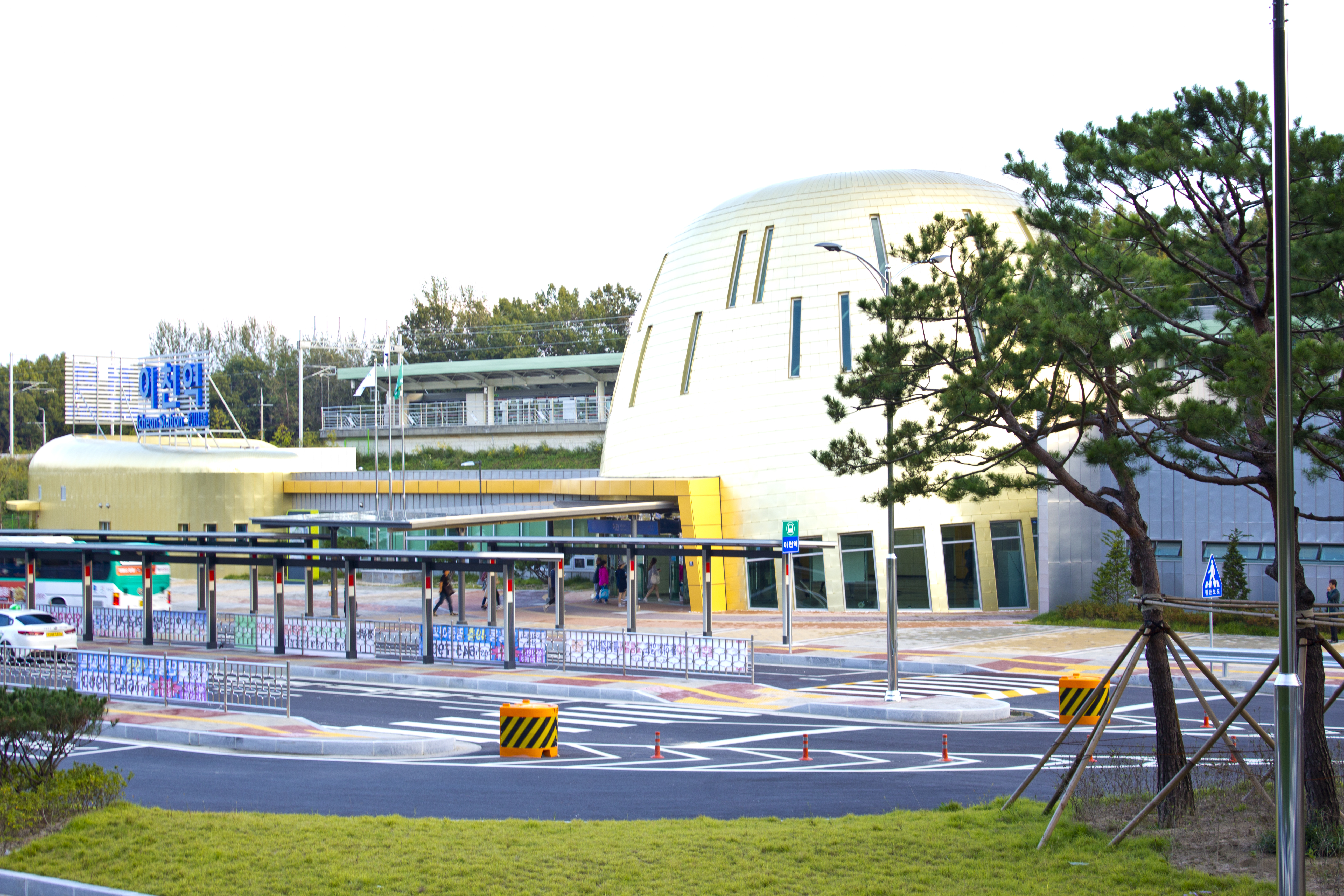 경강선 이천역 역사 전경